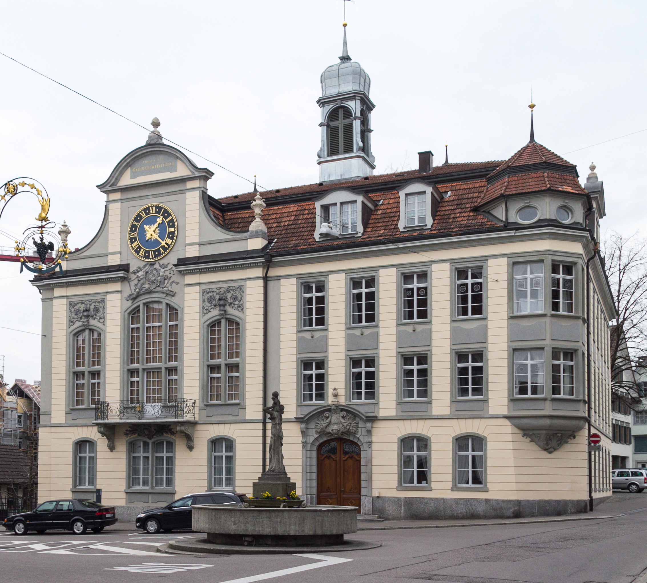 Rathaus